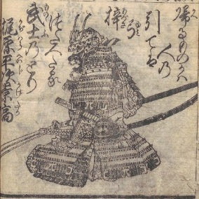 梶原景高